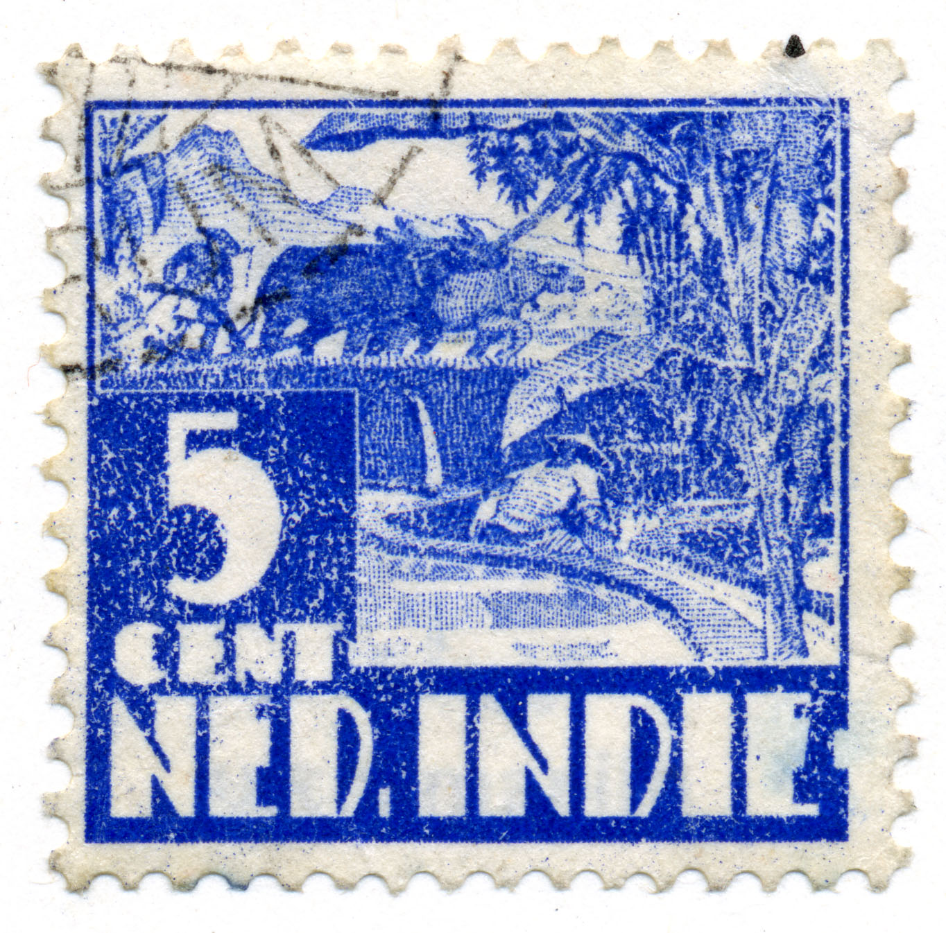 1934-1937 Nederlands-Indië Karbouw 5 cent